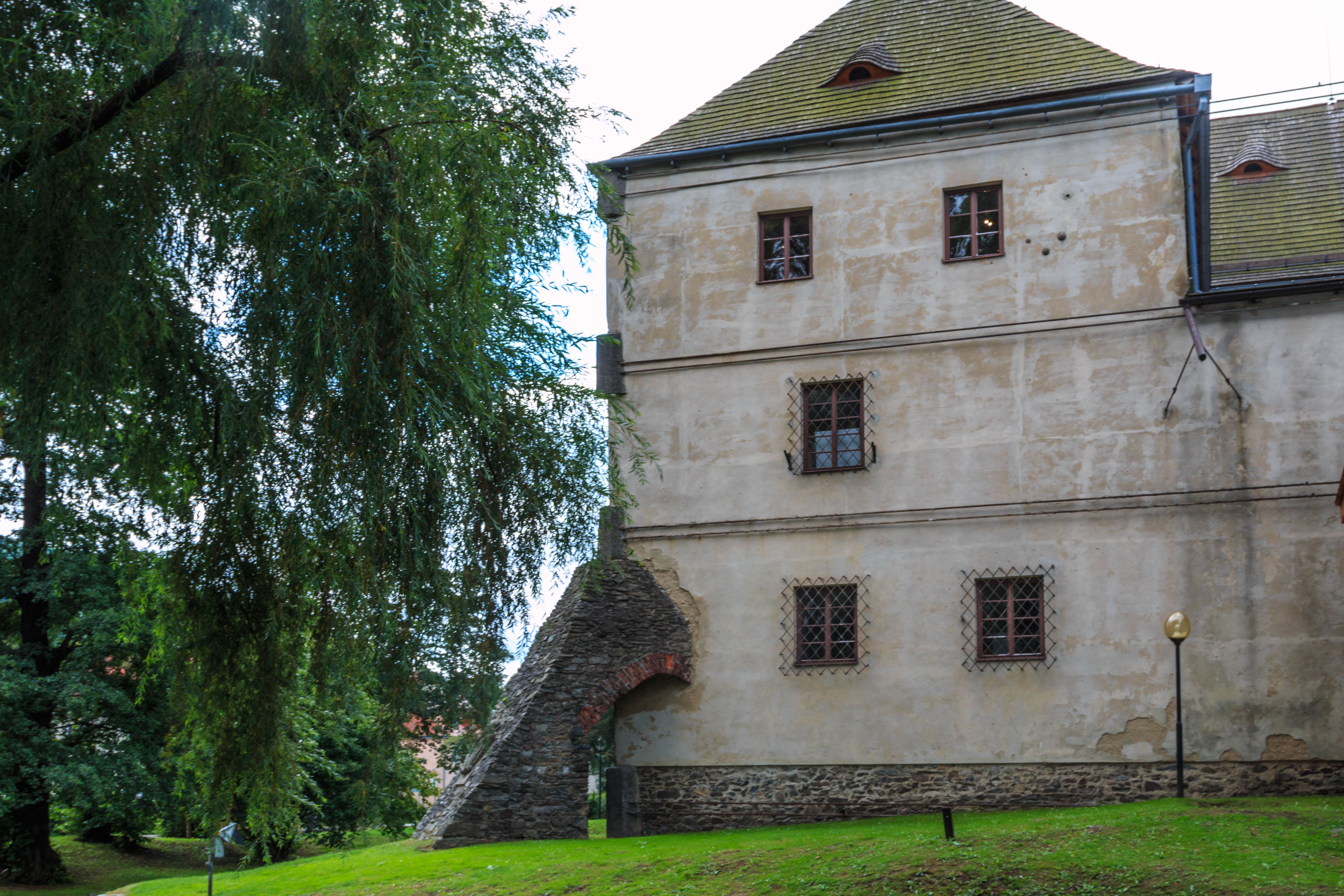 Vodní tvrz s parkem, Jeseník 120, východně od Masarykova náměstí, Jeseník.